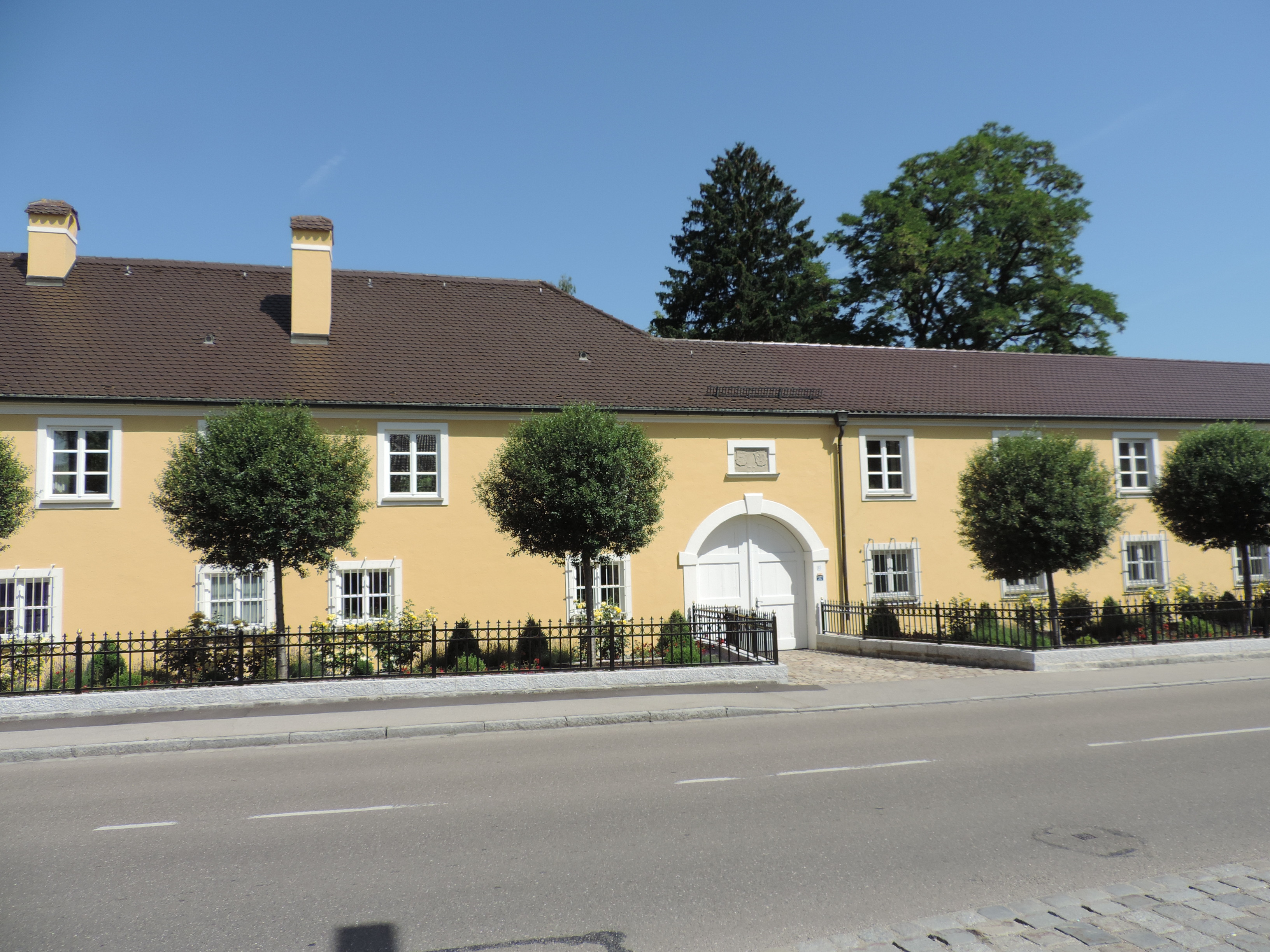 Fuggerschloss in Nordendorf